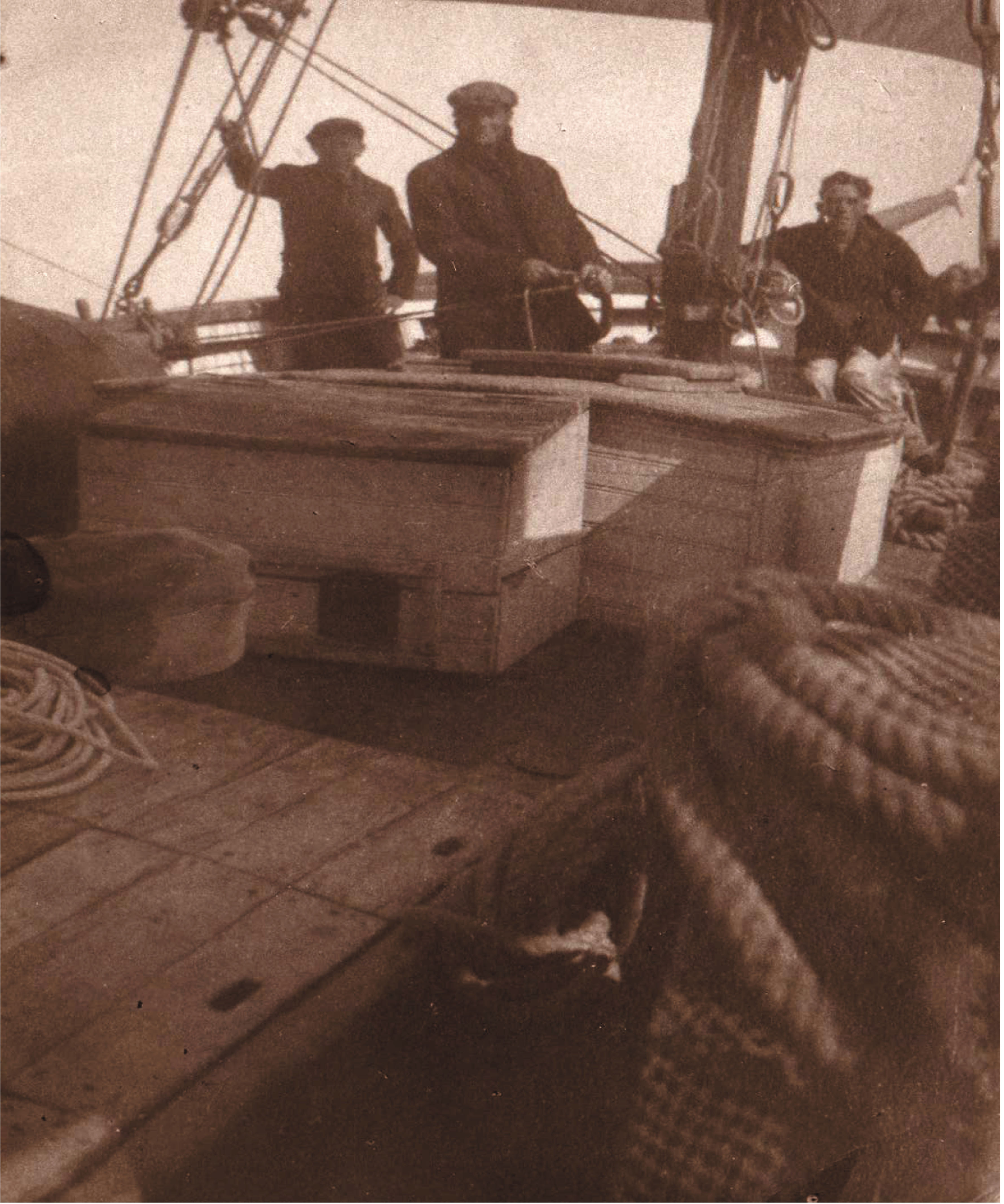 Sul ponte del leudo Ferdinando padre adibito a trasporto vini, armato a Sestri Levante